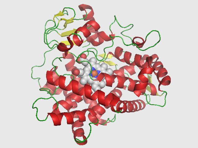 chem. Struktur von Cytochrom P450 2D6